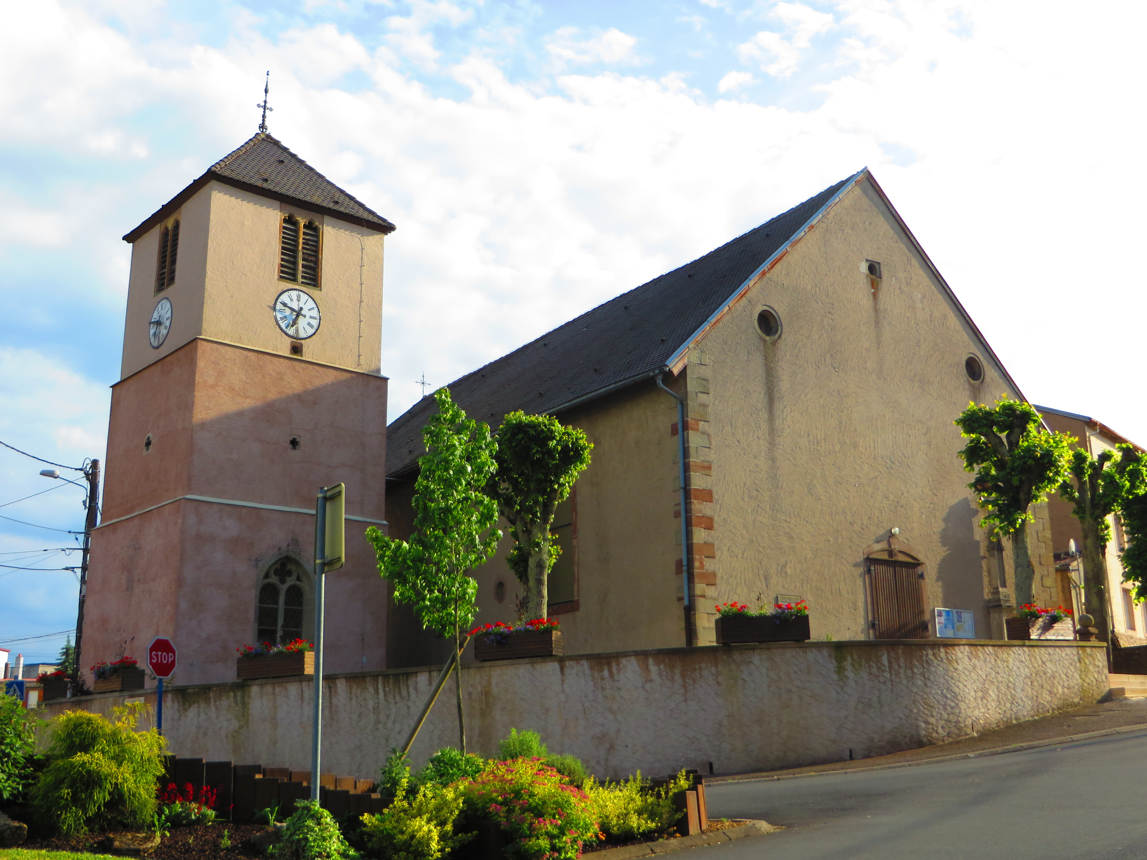 Heming eglise